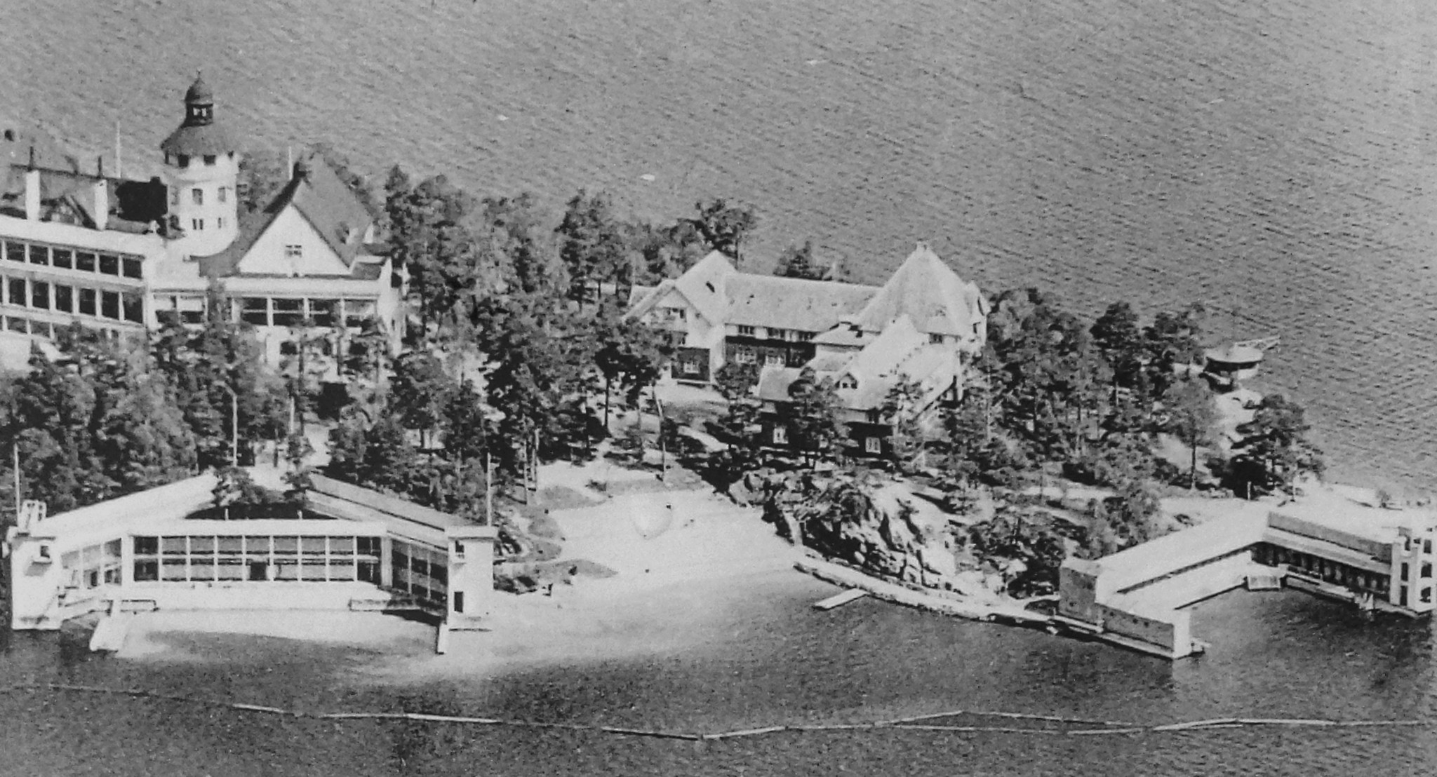 Saltsjöbadens friluftsbad på 1930-talet